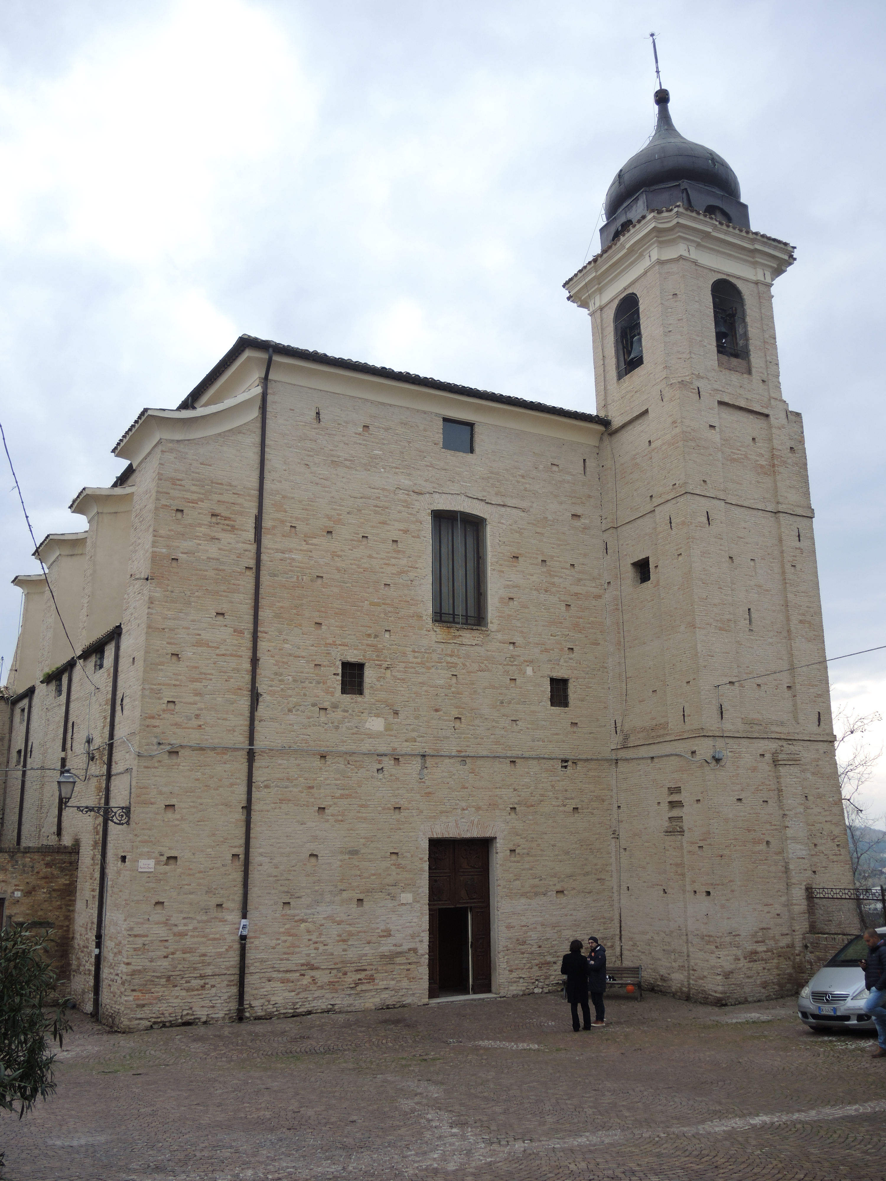 Penne: Chiesa di Santa Chiara